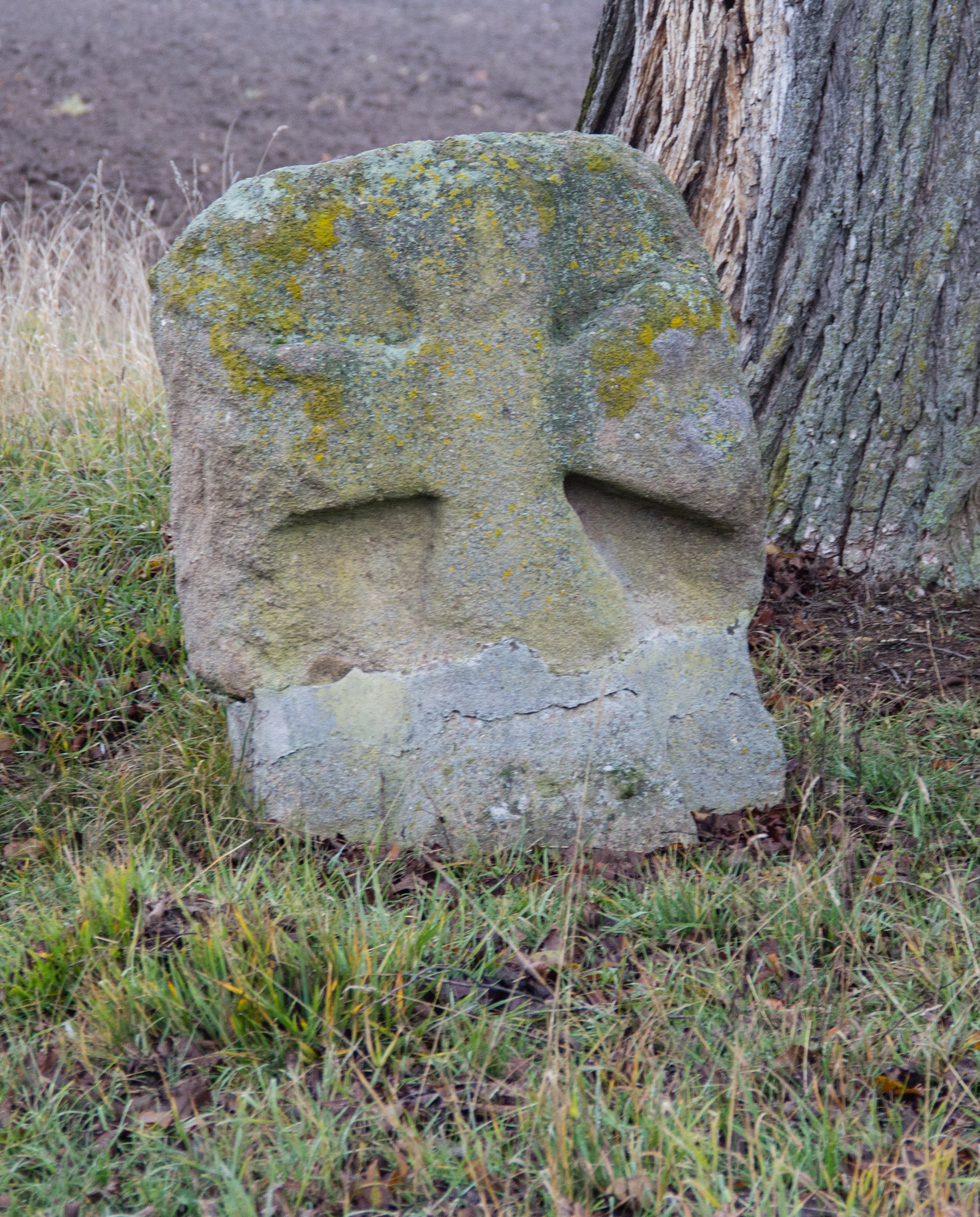 Steinkreuz,Sandstein, bei Jahrsdorf